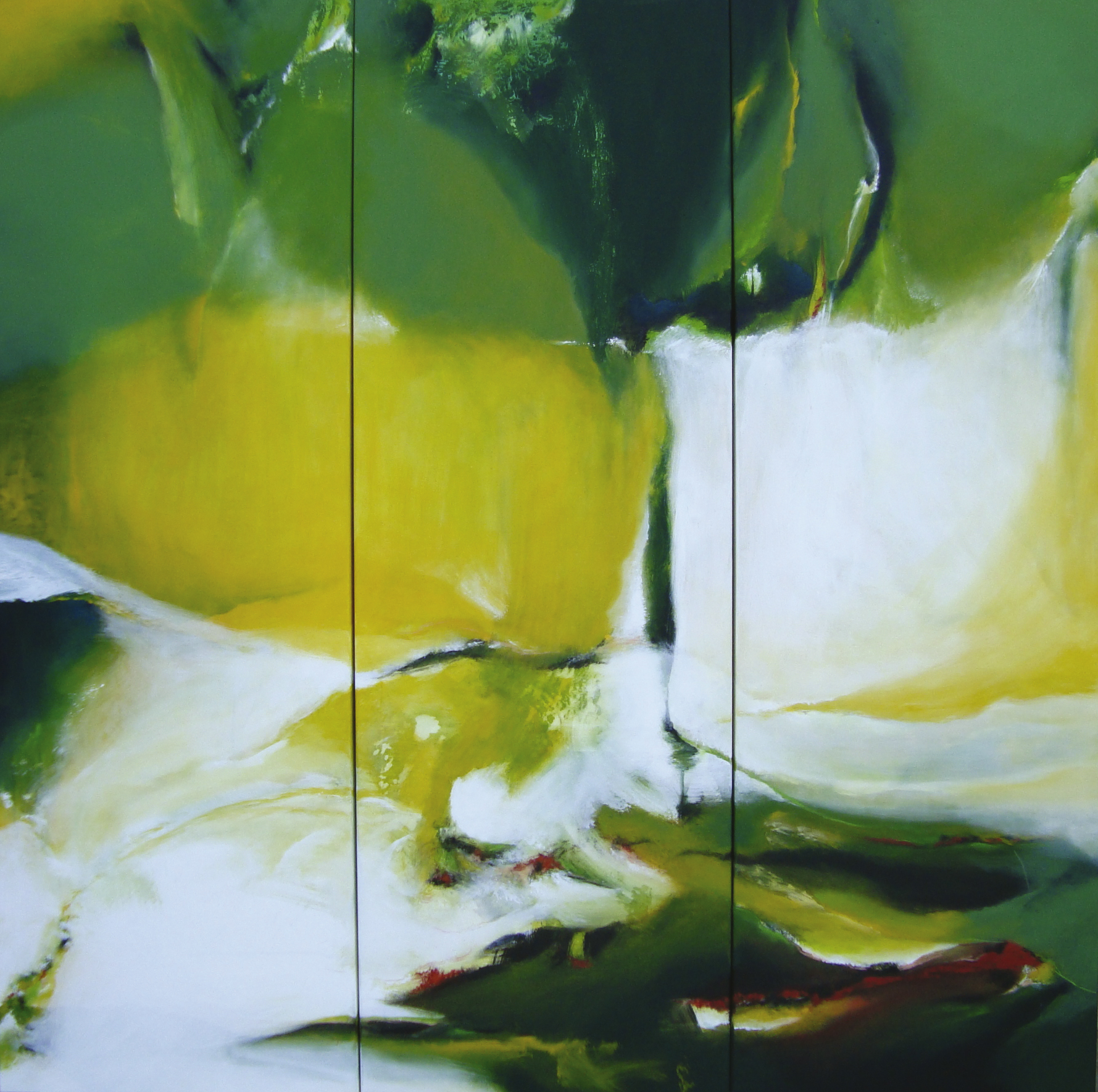 Hoffnungsvoll 2009, Acryl auf Leinwand,180 x 180 cm